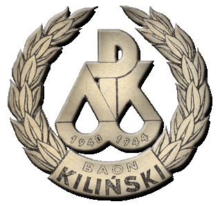 Logo batalionu AK Kilinski. Opis odznaki: Owalny wieniec laurowy, wychodzący z okienka napisem BAON / KILIŃSKI. W wieńcu litery AK i symbol "kotwicy", na której ramionach widać daty 1940-1944.